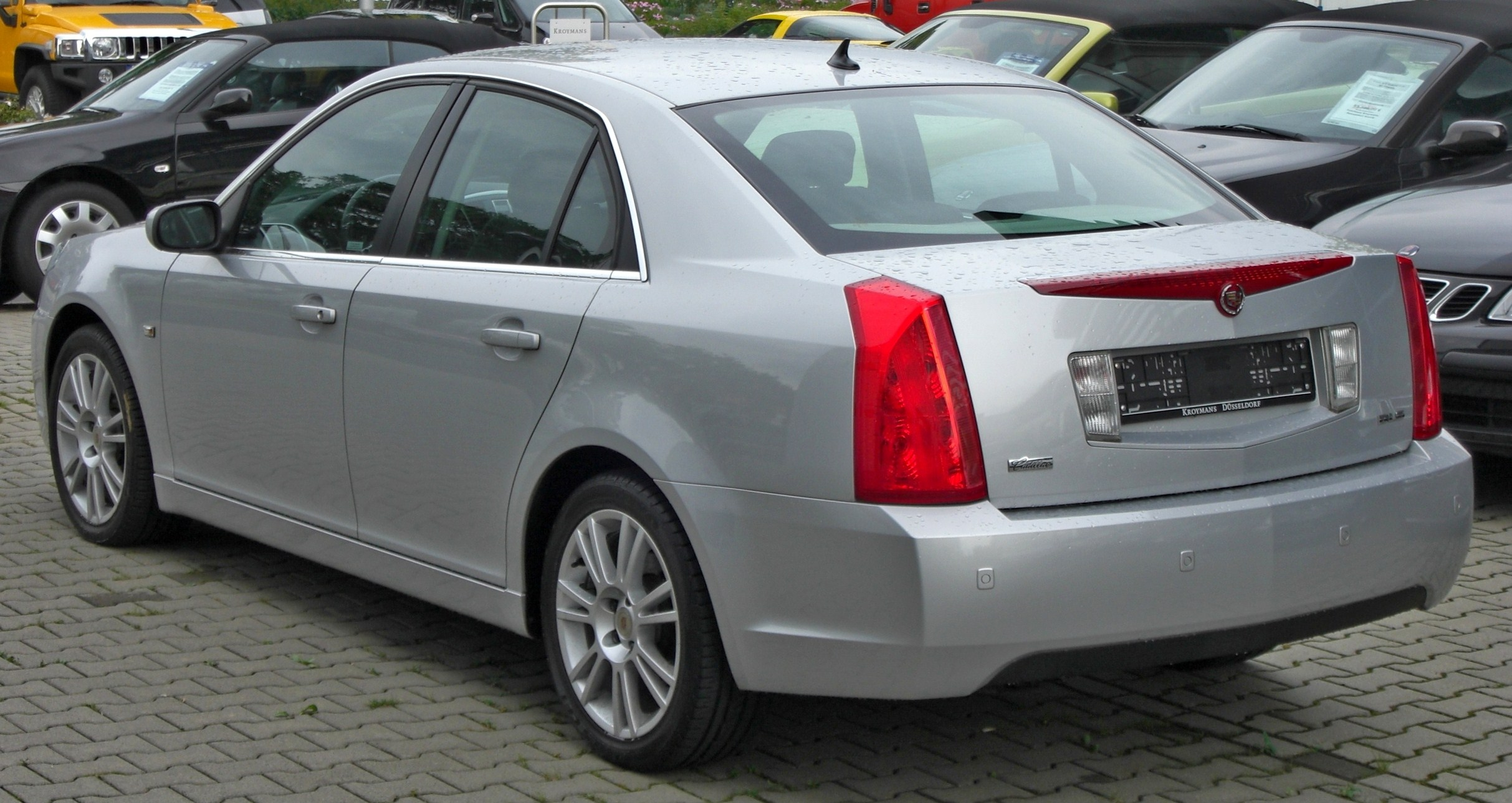 Cadillac BLS